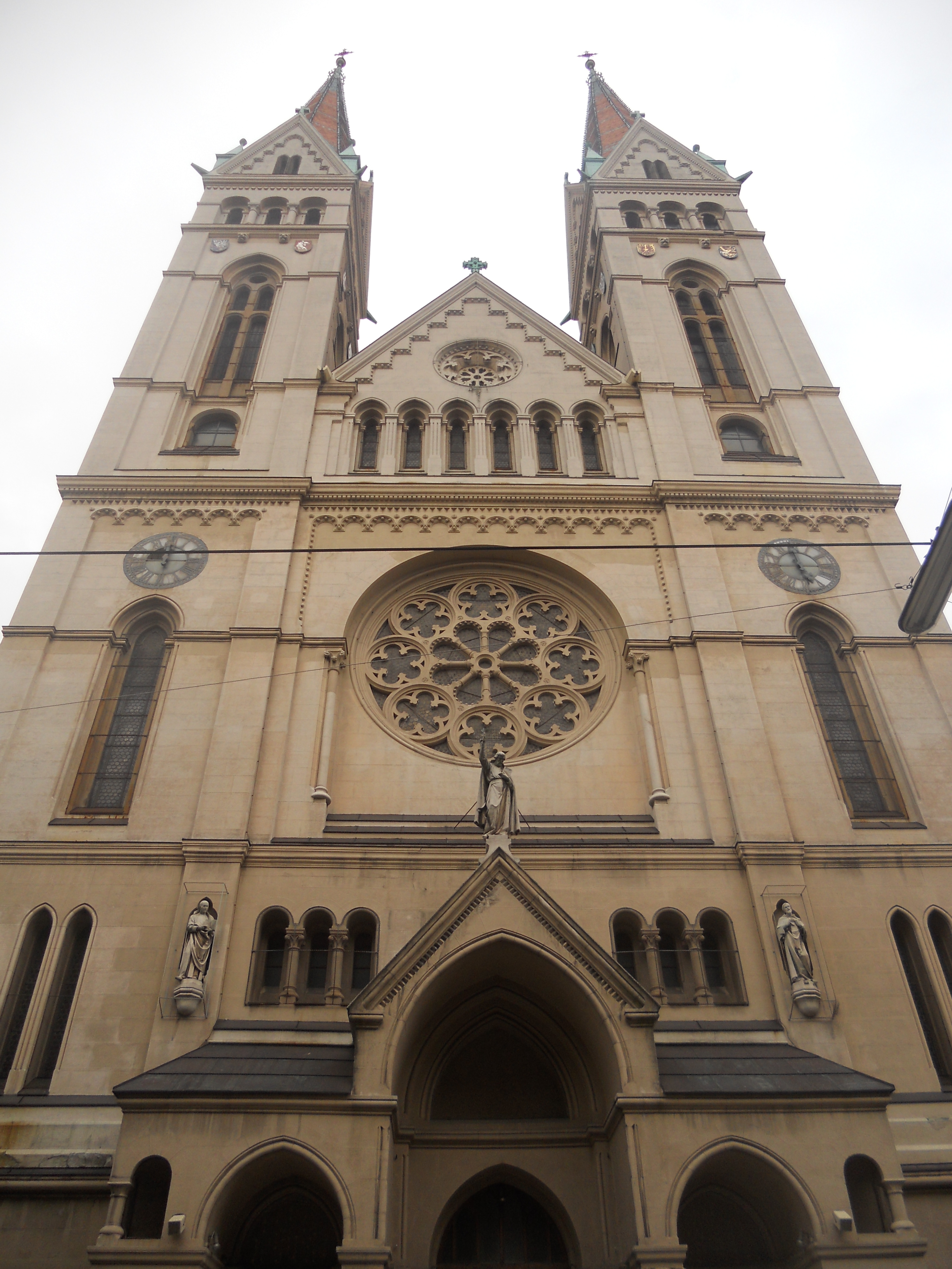 Die Vorderseite der Canisiuskirche in Wien-Alsergrund